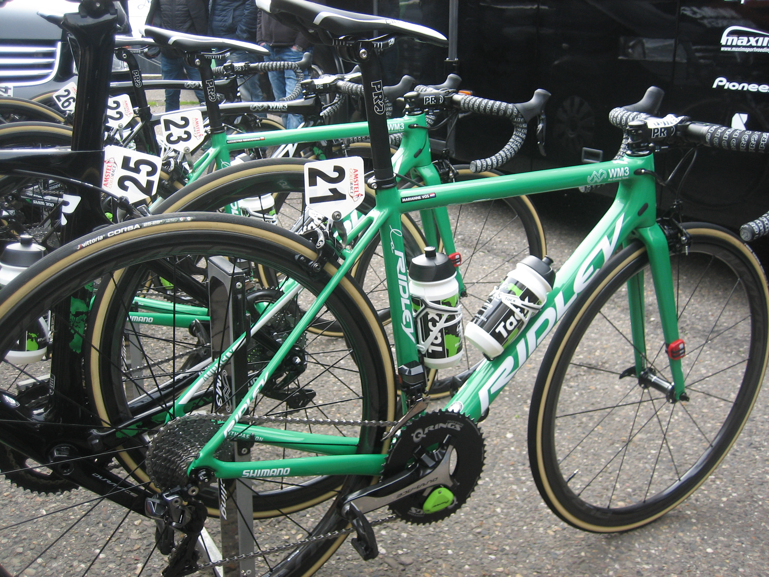 Start van de Amstel Gold Race Ladies Edition 2017 in Maastricht.